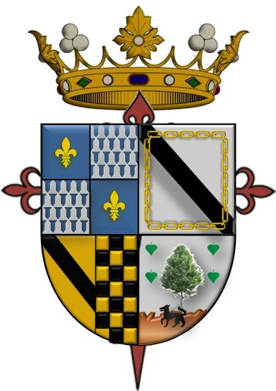 Escudo del Marques de San Lorenzo de ValleUmbroso pintado en el documento de otorgamiento del titulo dado por el Rey Carlos II de España a Don Rodrigo de Esquibel y Jaraba. Corresponde a los apellidos "Esquibel", "Zuñiga", "Xaraba" y "Arnedo".